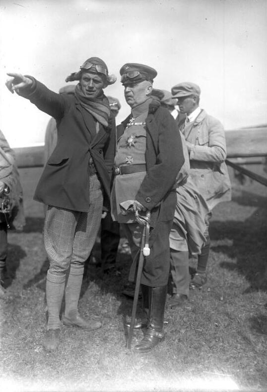 Von den grossen deutschen Herbst-Segelflügen in der Rhön in Anwesenheit des Generals v. Ludendorff, wobei ein Weltrekord von 12 km Langstreckenflug von dem bekannten Segelflieger Martens aufgestellt wurde. General v. Ludendorff im Gespräch mit dem Rekordflieger Martens.